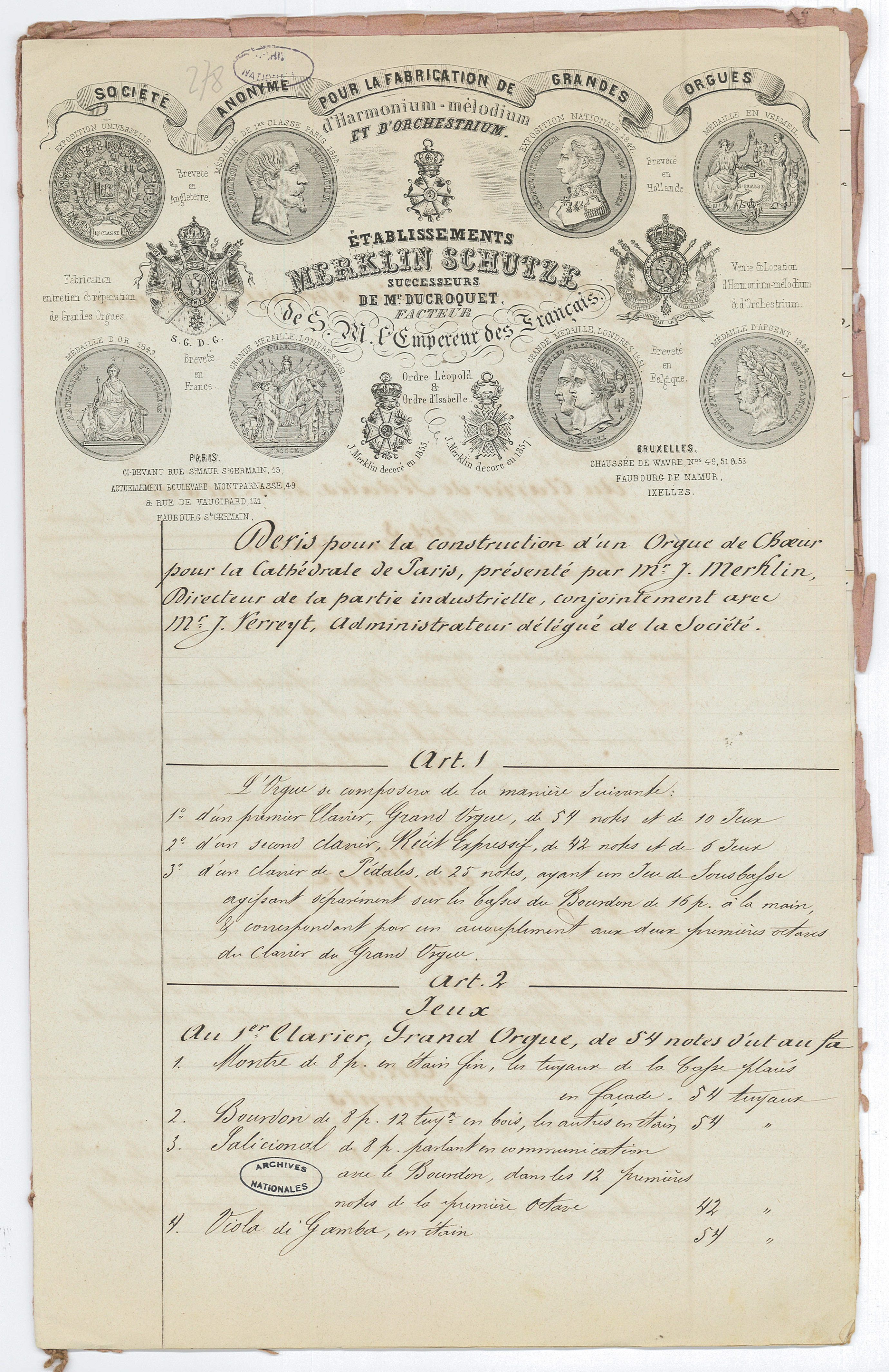 Devis avec entête de l'entreprise de facture d'orgue Merklin-Schütze (Paris) pour la construction d'un orgue de chœur pour la Cathédrale Notre-Dame de Paris. Source : Archives nationales, cote F/19/7802.